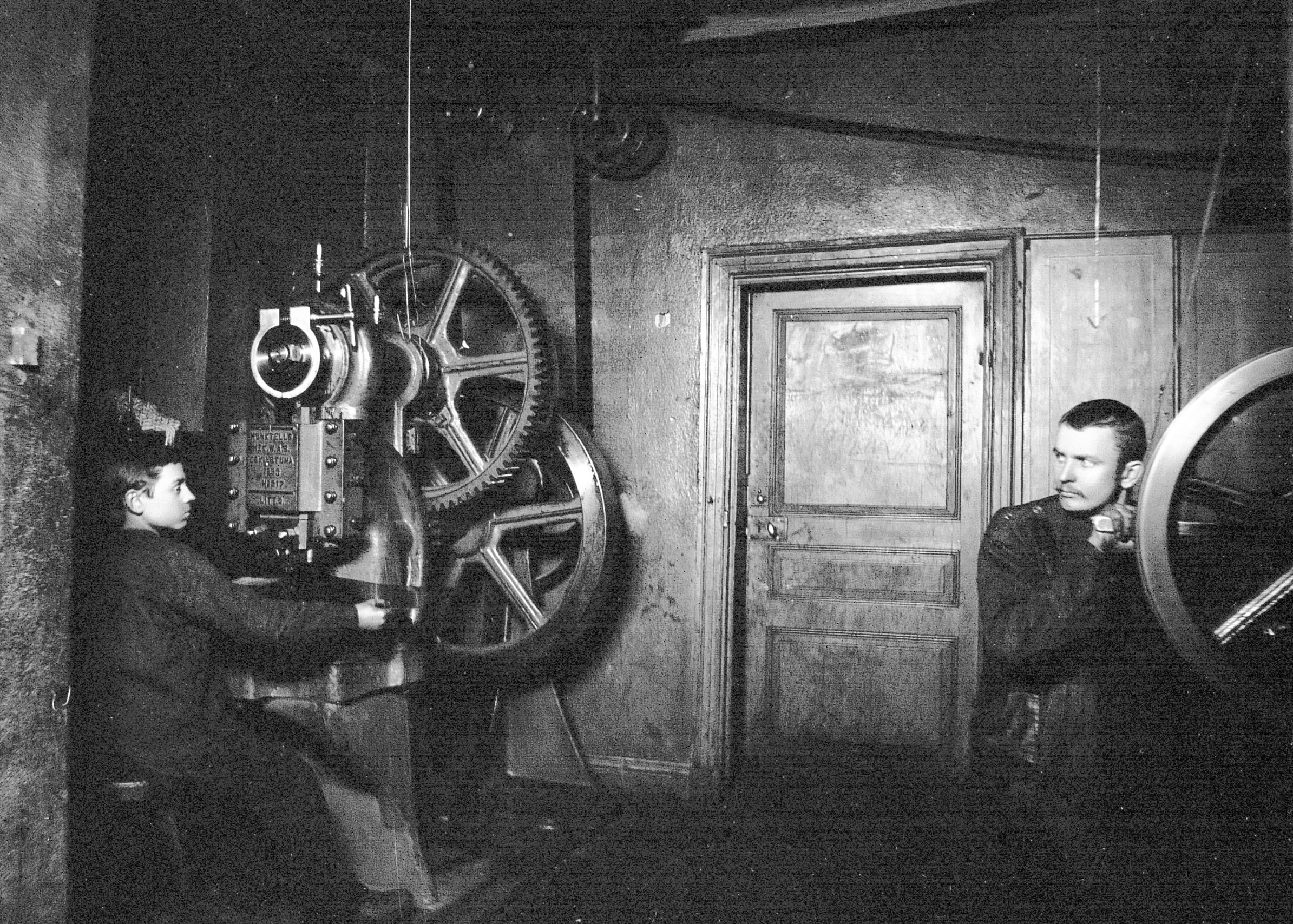 Televerkets verkstad i Bångska huset, Fiskargatan